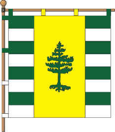 Прапор міста Рубіжне